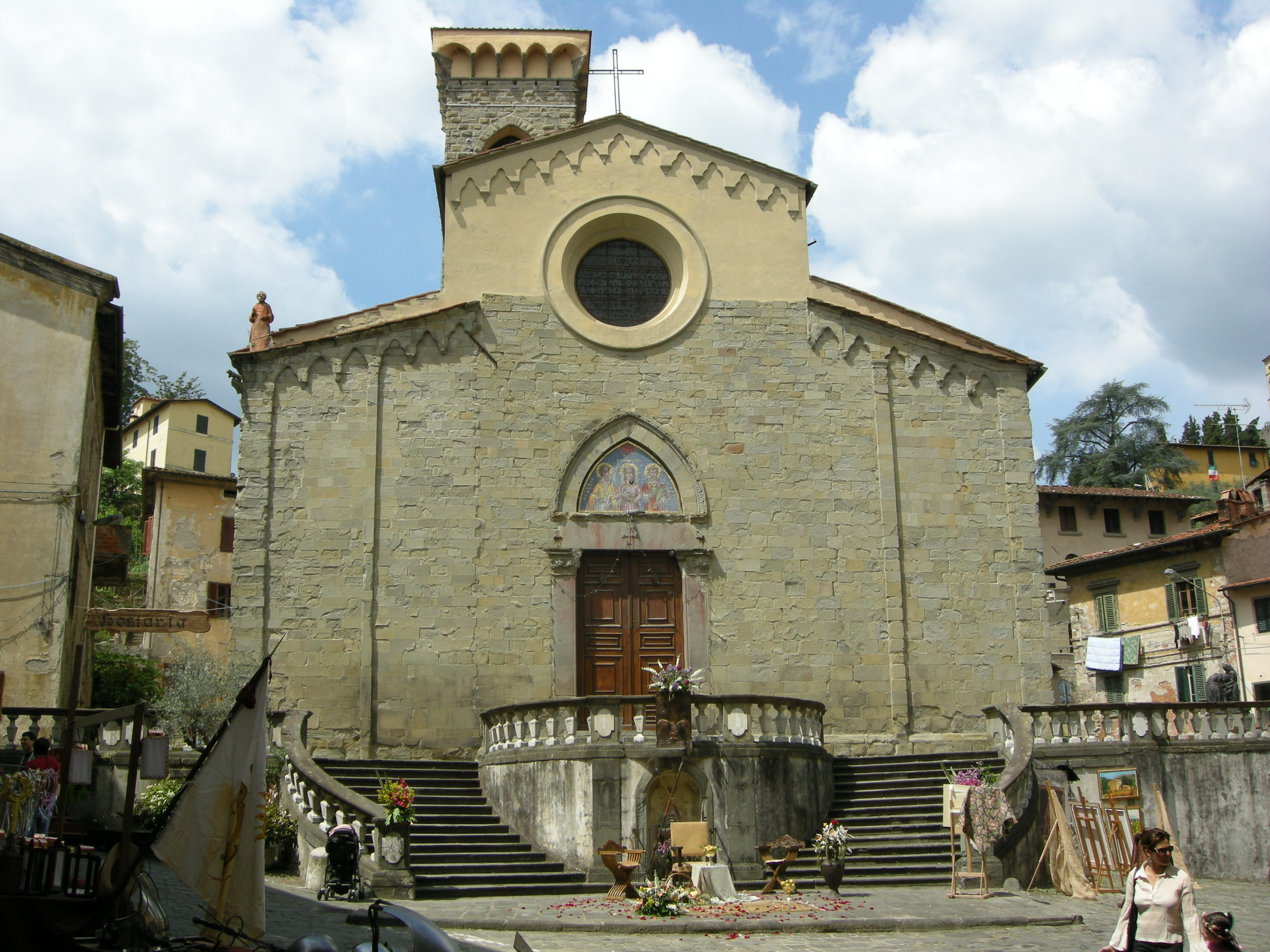 Santi stefano e niccola